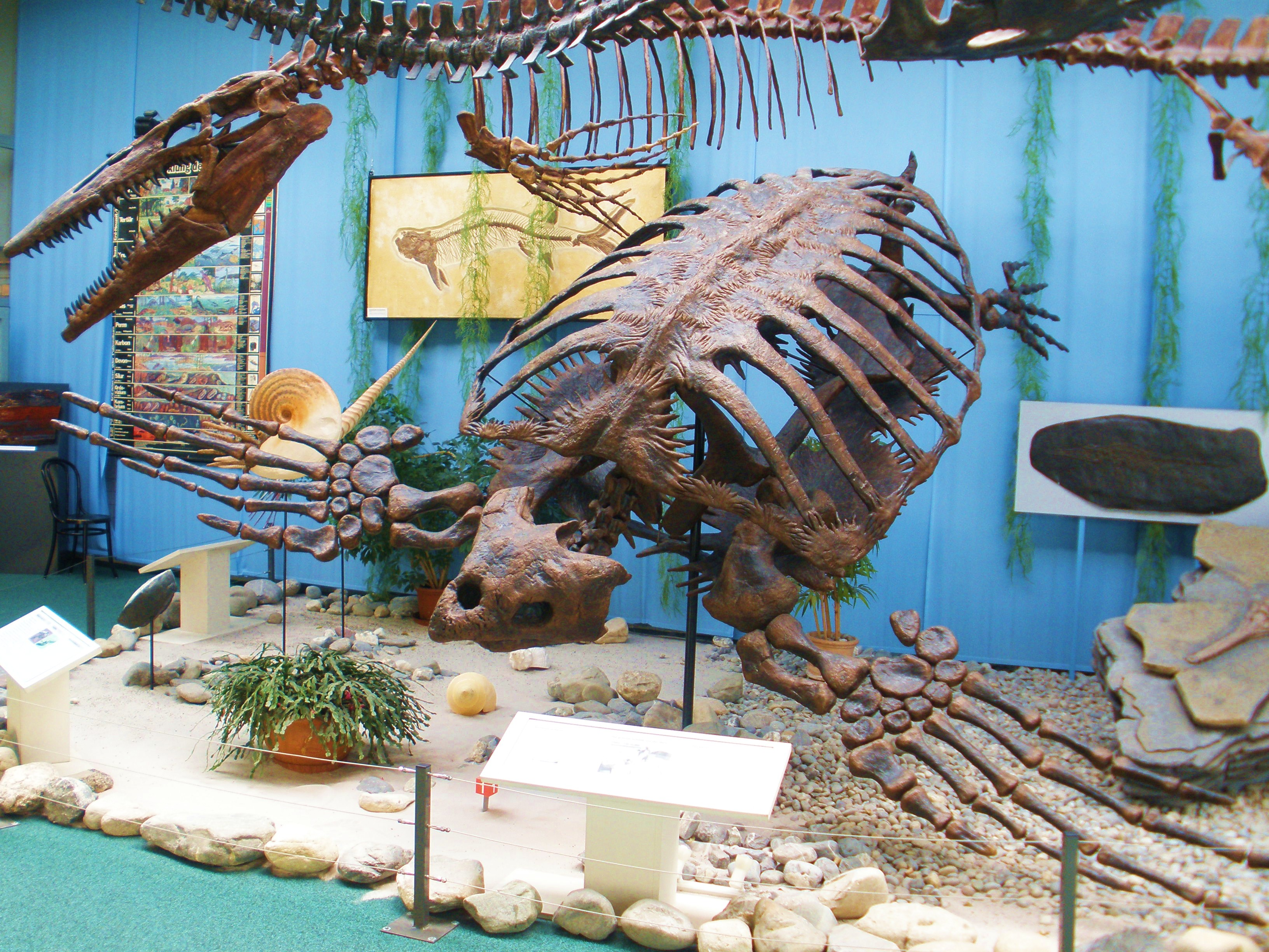 Fossil Archelon